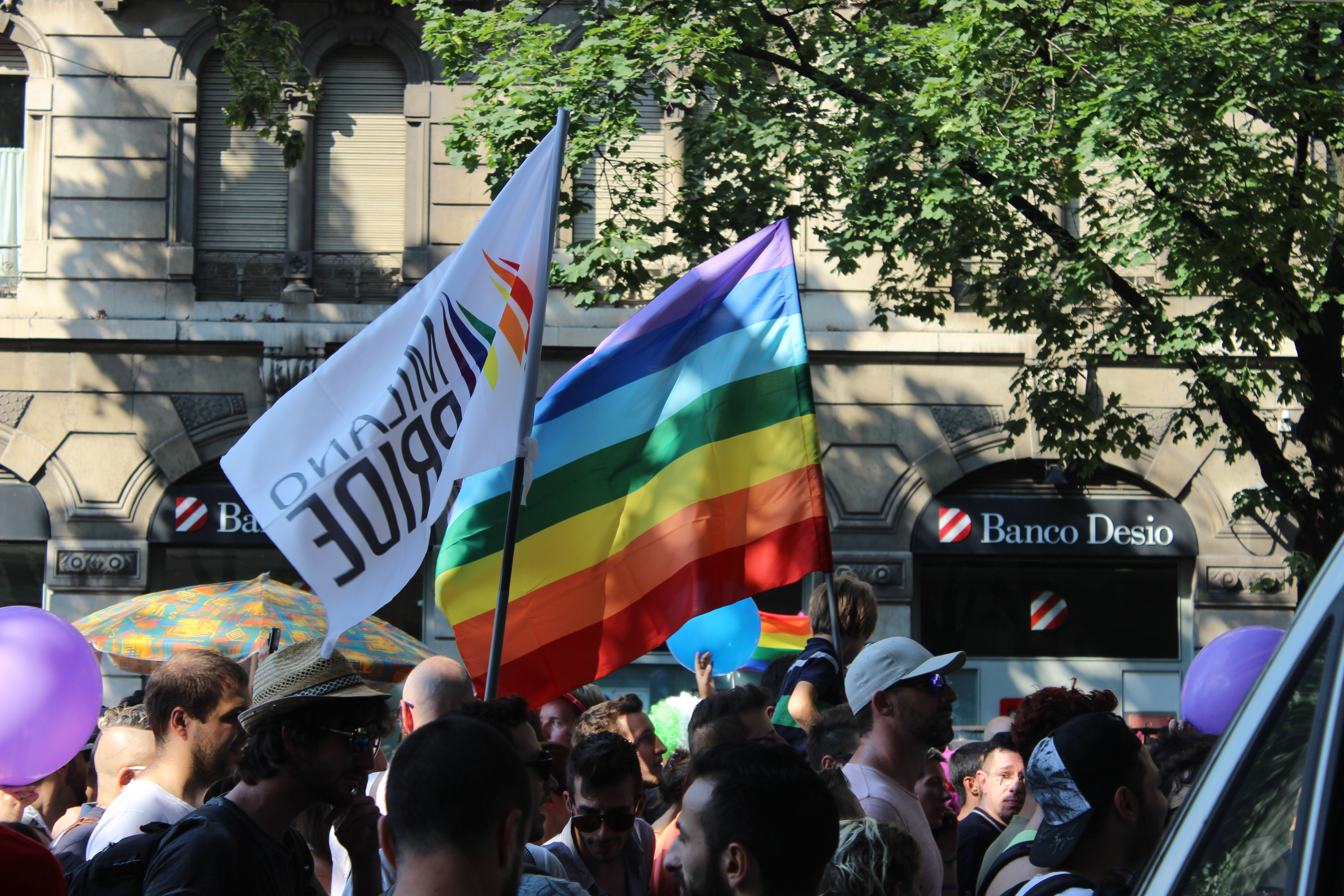 MilanoPride2015